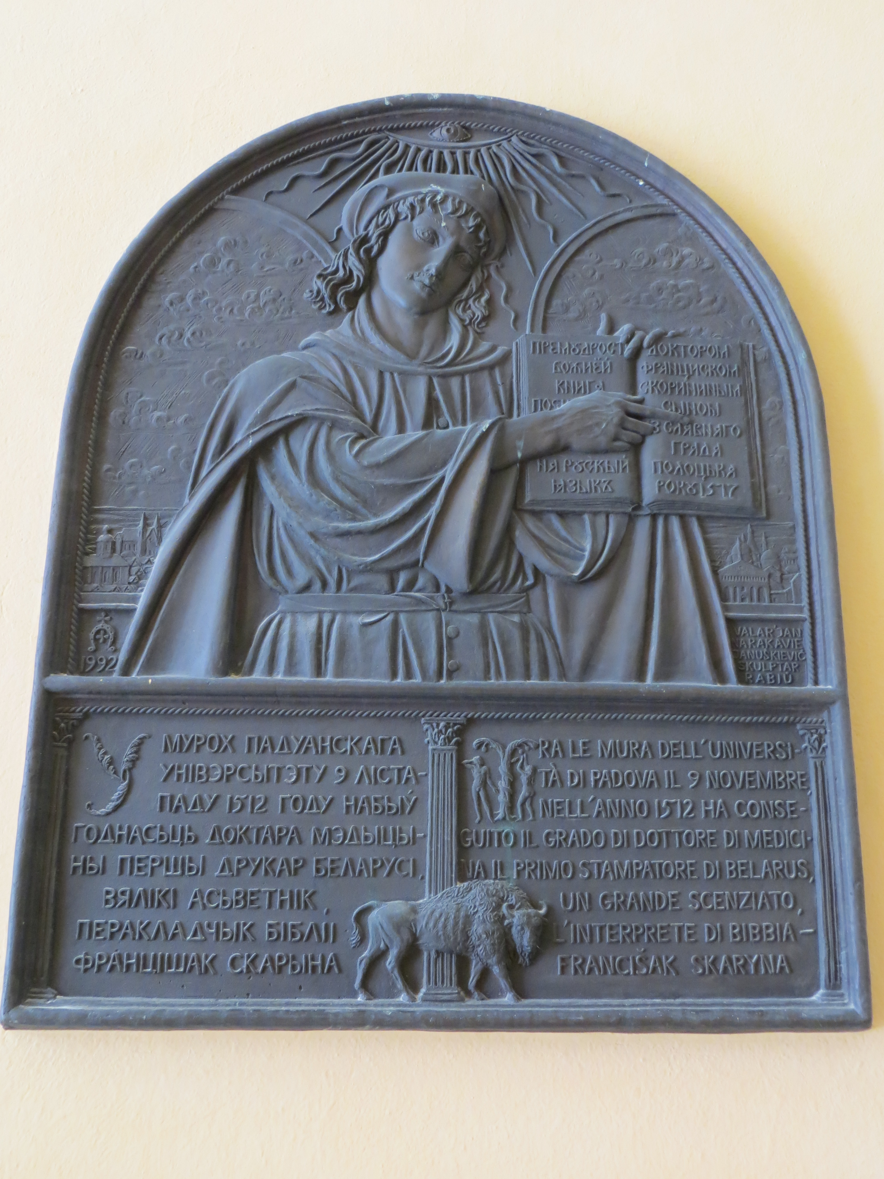 Беларуская (тарашкевіца): Памятная дошка ў гонар Францішка Скарыны. Падуанскі ўнівэрсытэт